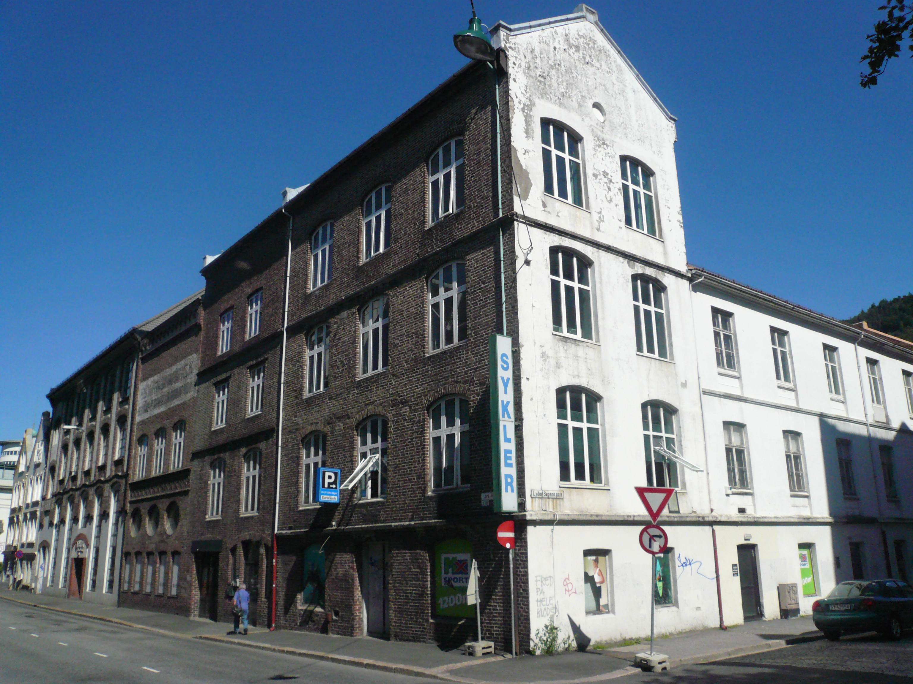 Arkitekt Schak Bulls gardinfabrikker for AS Skandinavisk Aktietyllgardinfabrikk / Tangens gardinfabrikk (C. Sundt) (1890/1898/1914)